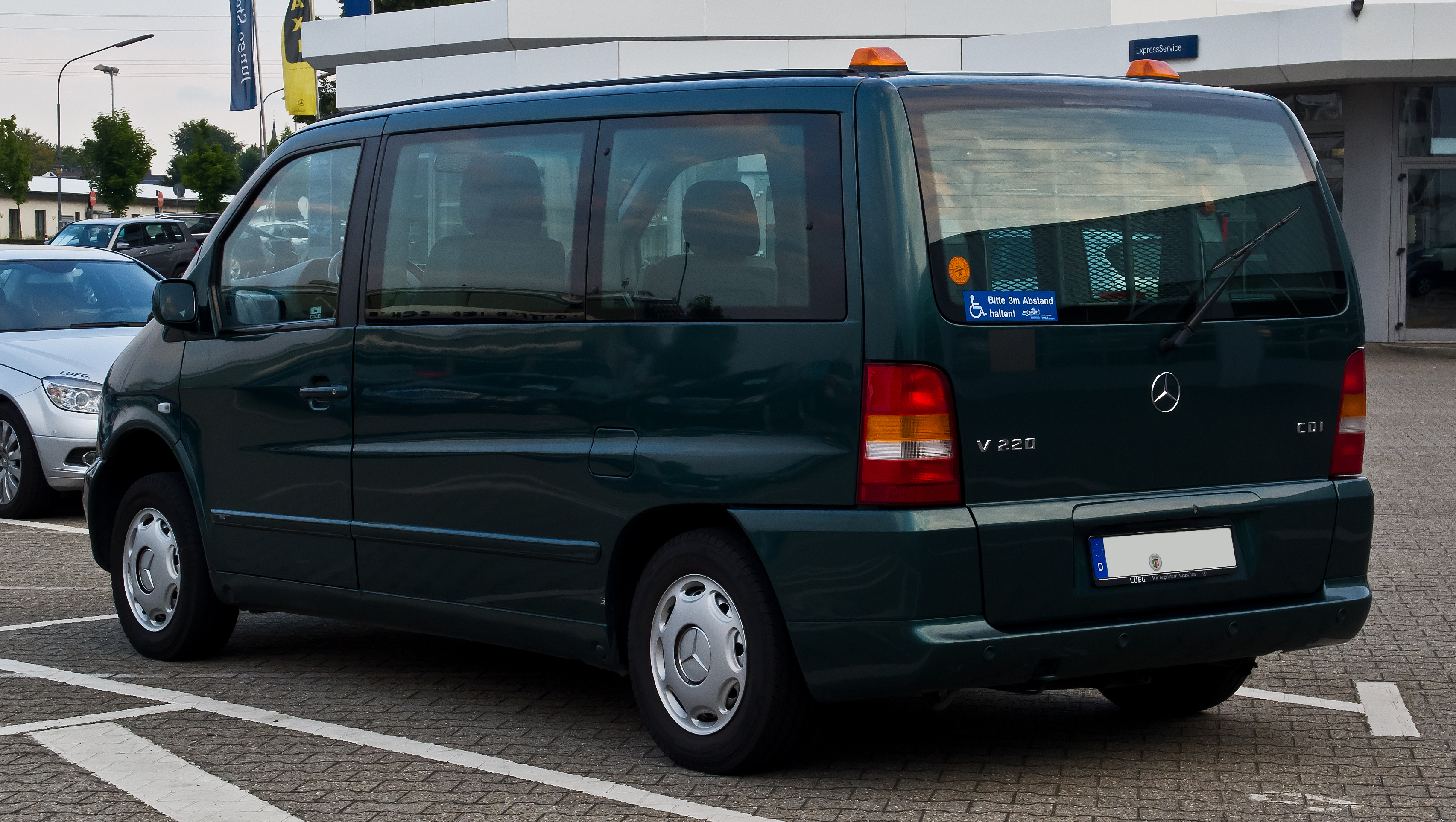 Mercedes-Benz V 220 CDI Trend (W 638)